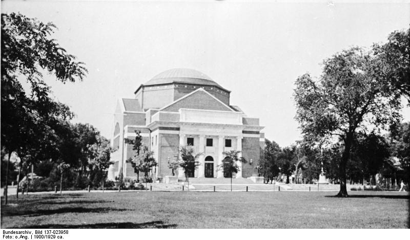 Nord-China, Peking, Tsing-Hua College